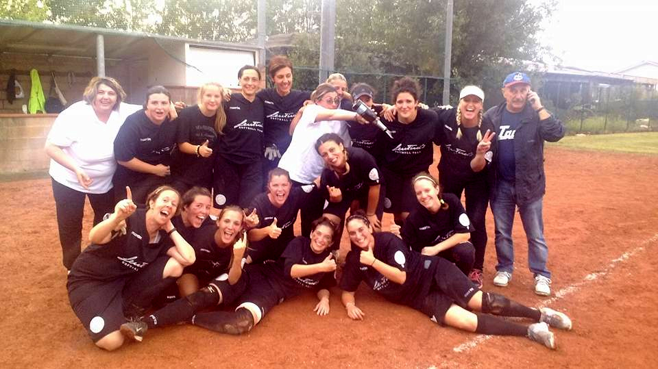 la squadra vince il playoff di serie B